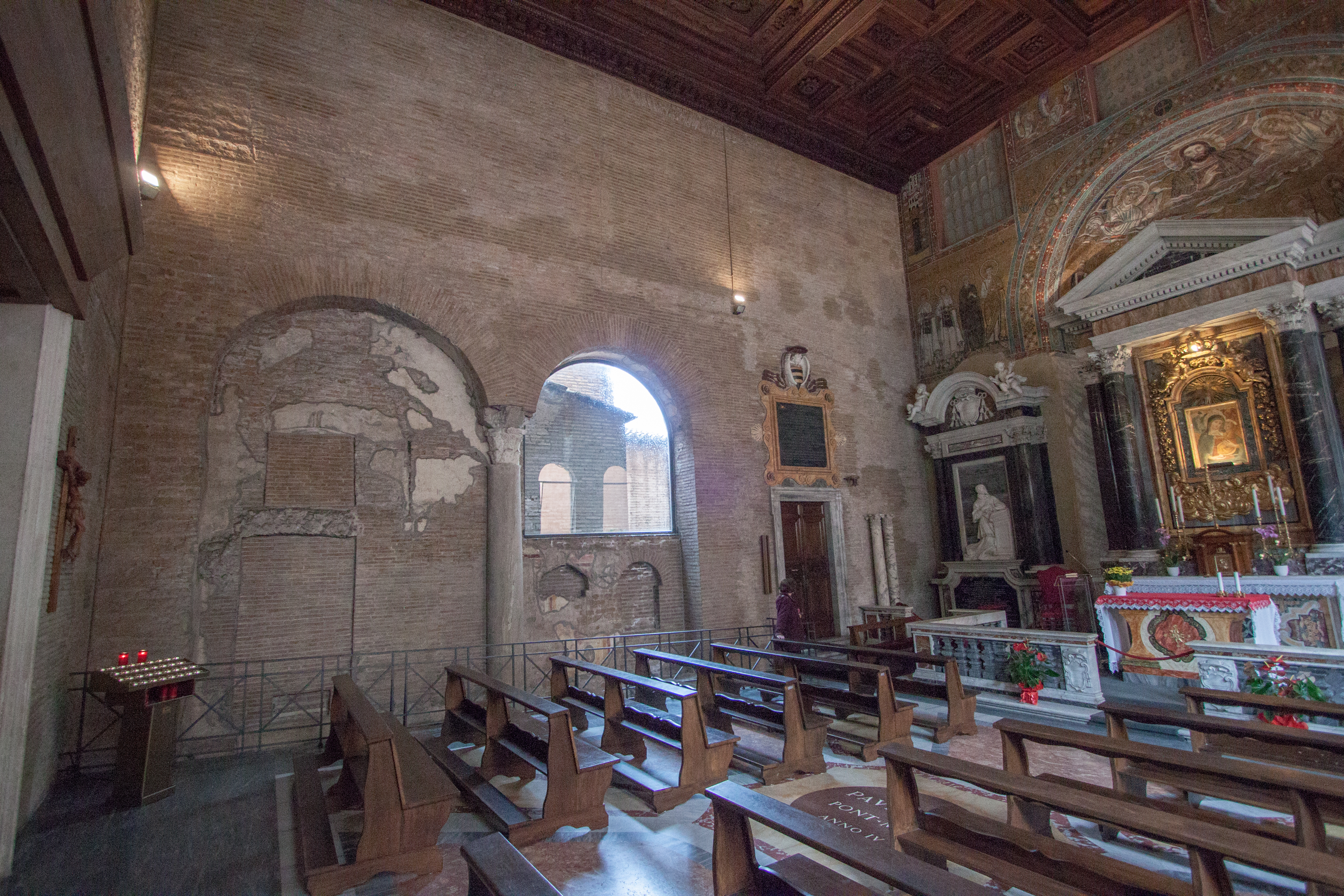 Battistero S Giovanni in Laterano